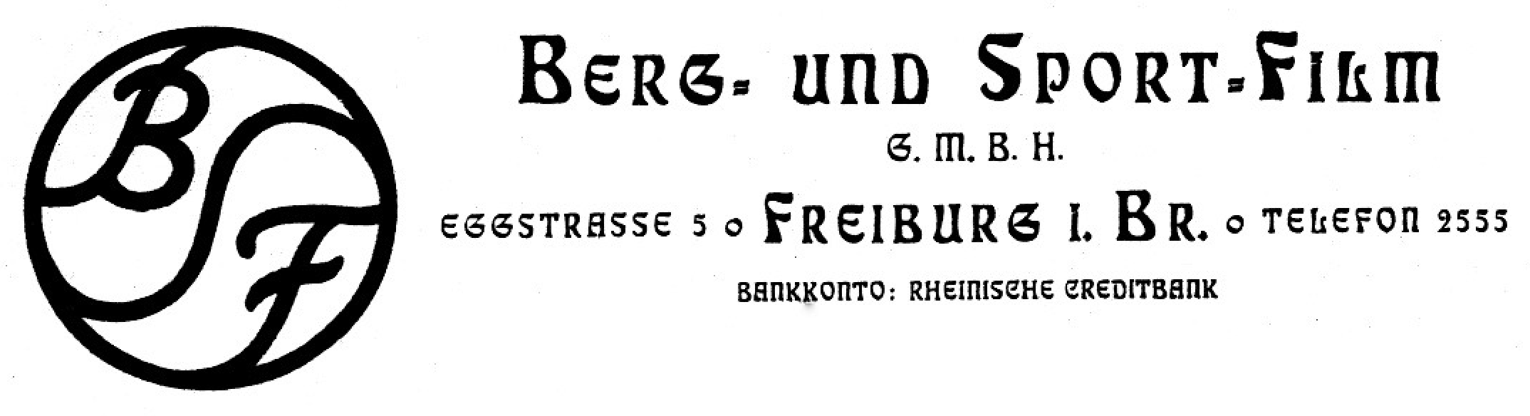 Briefkopf der im Jahr 1920 durch den Ethnologen Odo Deodatus I. Tauern (1885–1926) und den Geologen Arnold Fanck (1889–1974) gegründeten Berg- und Sport-Film G.m.b.H. in Freiburg im Breisgau, dem sich auch der Forscher Rolf Bauer und ab 1921 der Arzt Bernhard Villinger (1889–1967) als Teilhaber anschlossen. Durch dieses Unternehmen und die dort beschäftigten versierten und wagemutigen Bergsteiger und Skifahrer, die sich in der Folge zu ebenso versierten Kameramännern entwickelten, geriet die Stadt in den 1920er Jahren zu einem Zentrum des deutschen Filmschaffens. Erster Kameramann des Unternehmens war Sepp Allgeier (1895–1968). Er war bereits als 16-jähriger Operateur (Kameramann) bei Bernhard Gottharts (1871–1950) Firma Express-Films Co.m.b.H., die auch als Redaktion und Verlag »Der Tag im Film« – Erste deutsche tägliche kinematographische Berichterstattung, Freiburg i. Br., firmierte.